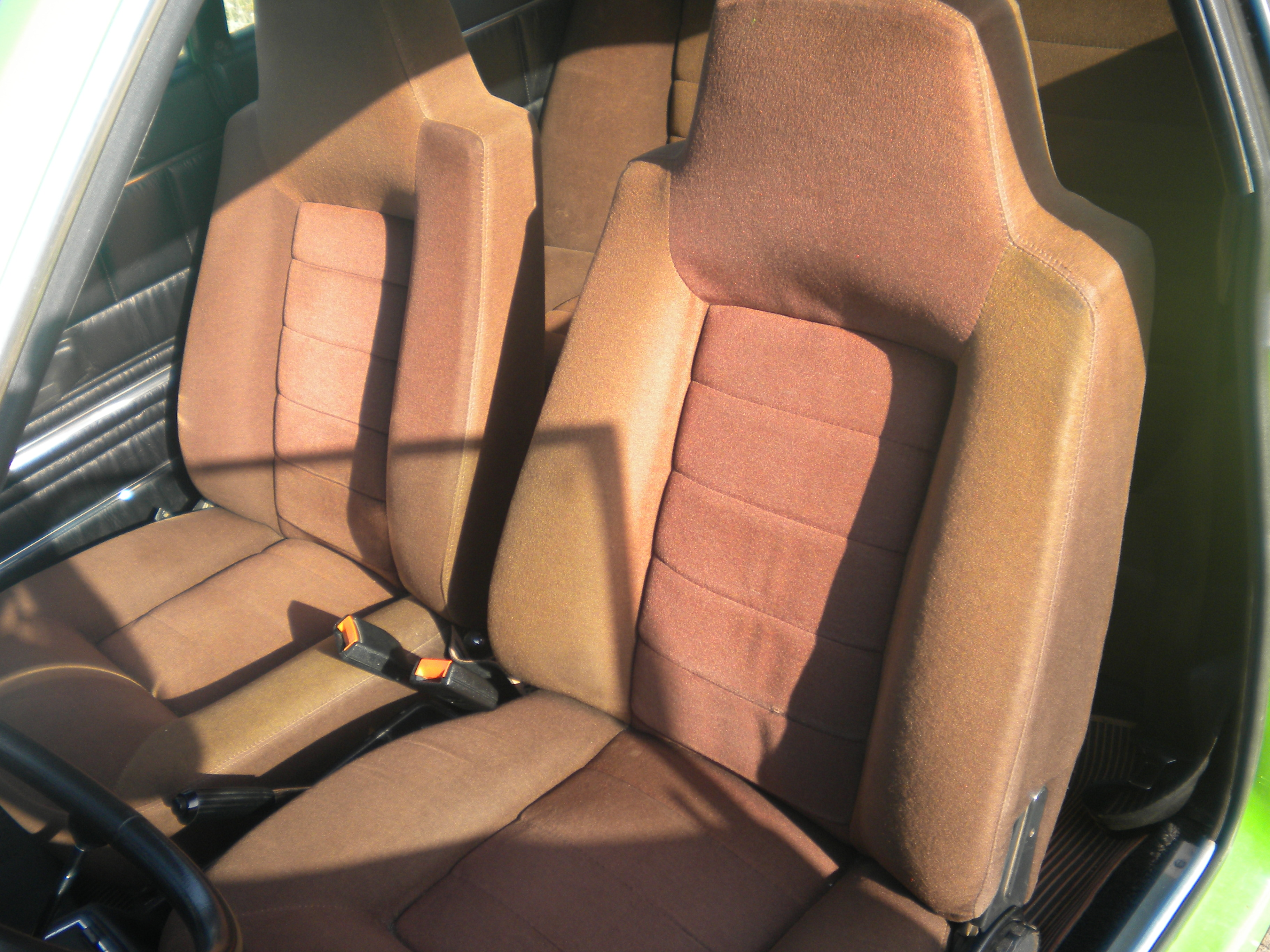 Futuristas asientos para la época.